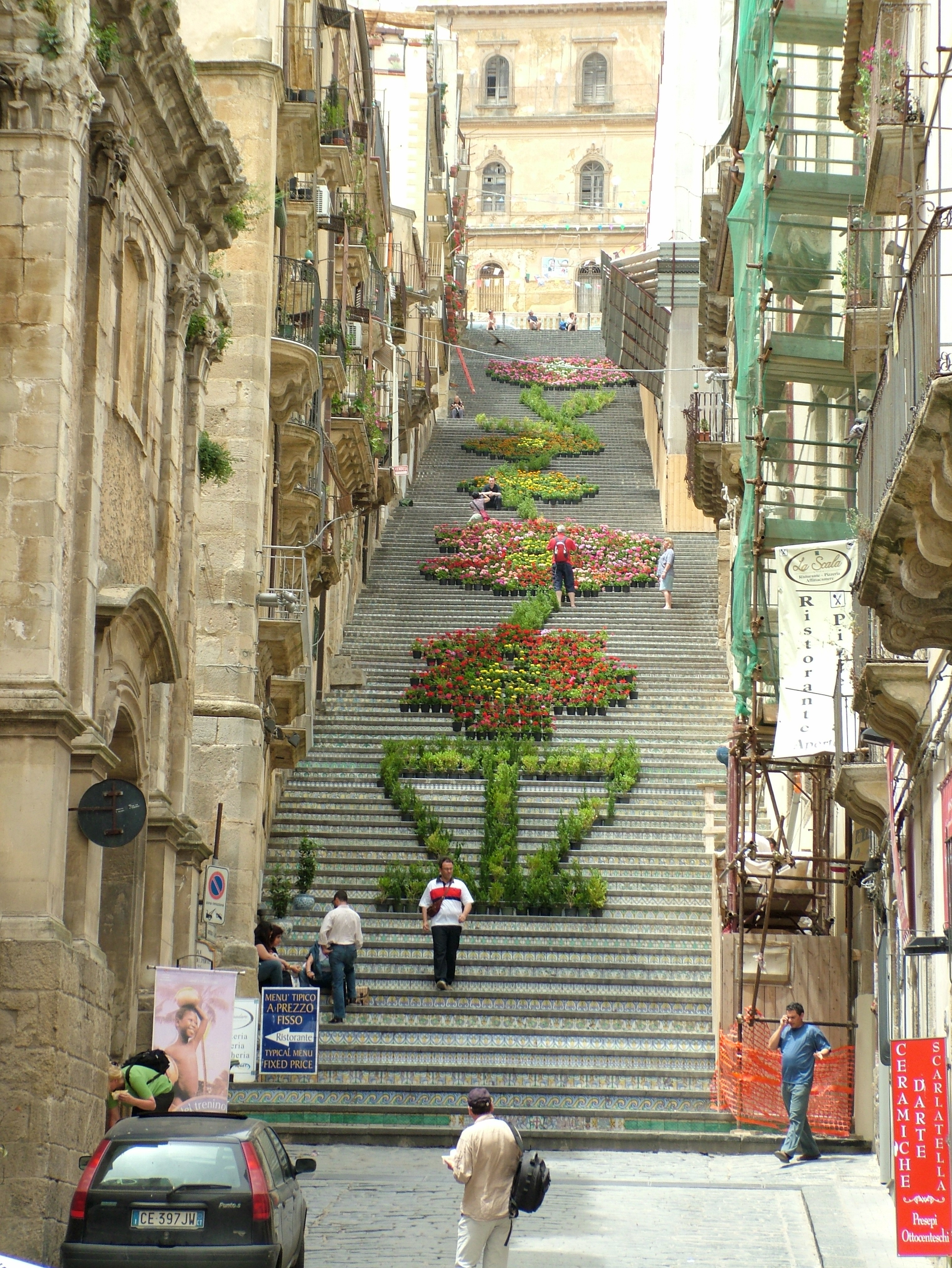 Caltagirone Sizilien Scala Santa Maria del Monte.